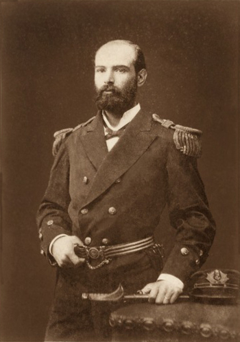 Arturo Prat Chacón (*Hacienda San Agustin de Puñual, Ninhue, Chile, 4 de abril de 1848 - † Iquique, Chile, 21 de mayo de 1879) Máximo héroe naval chileno, inmolado por su patria en el combate naval de Iquique el 21 de mayo de 1879.